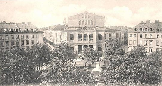 Historische Aufnahme